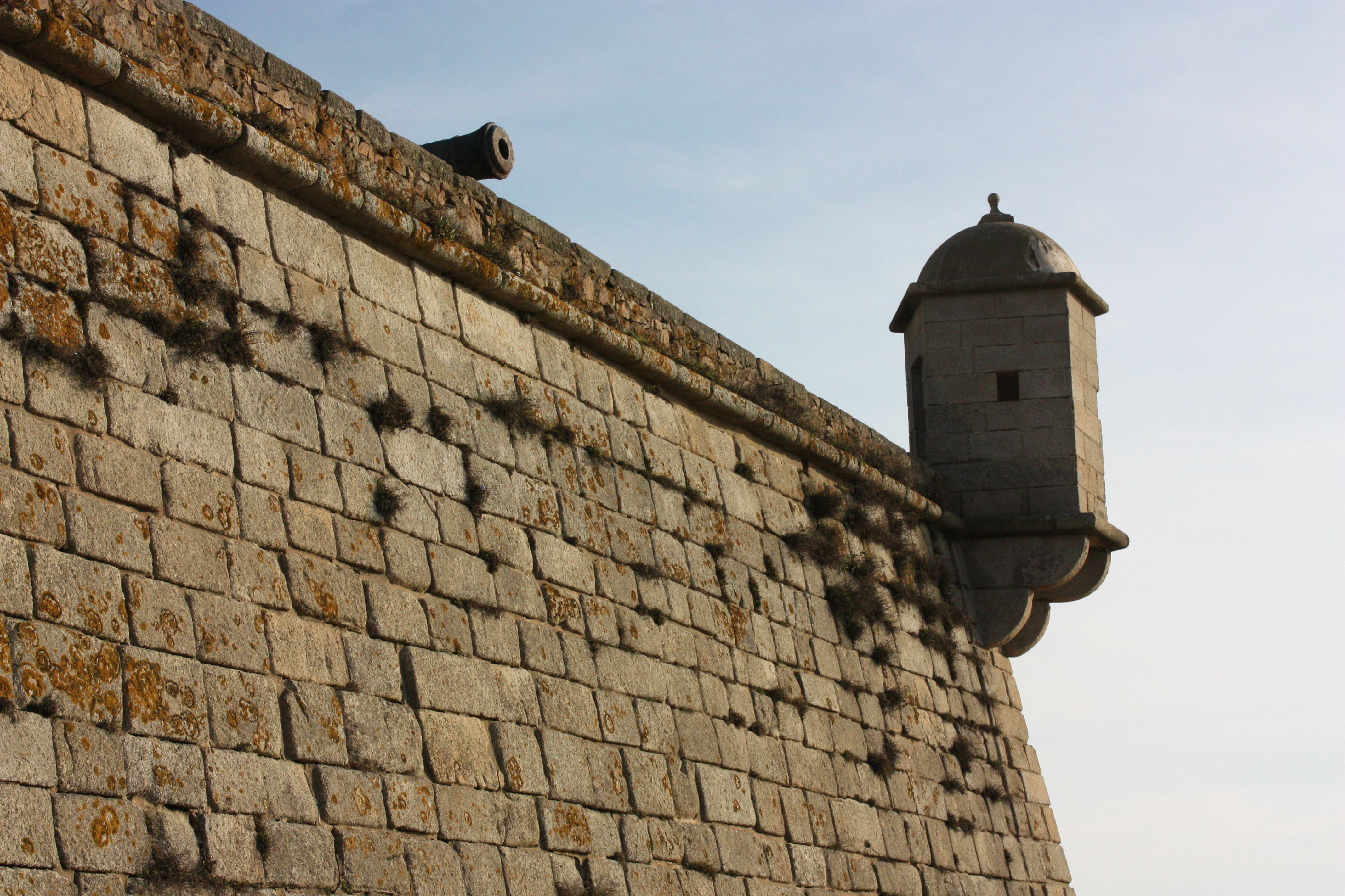 Castelo do Queijo